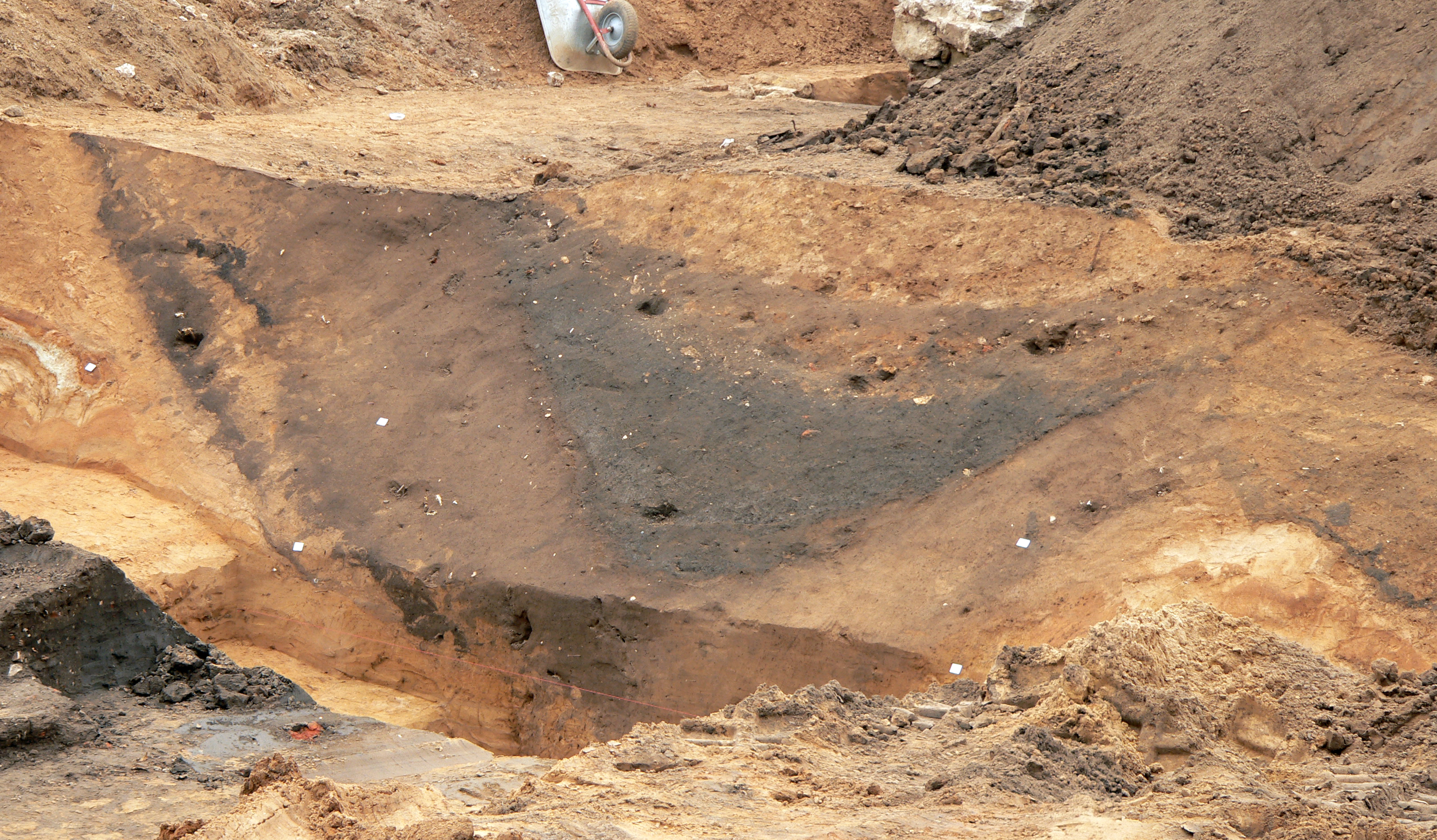 Stadtgrabenabschnitt bei den Hofmarställen am Hohen Ufer Hannover